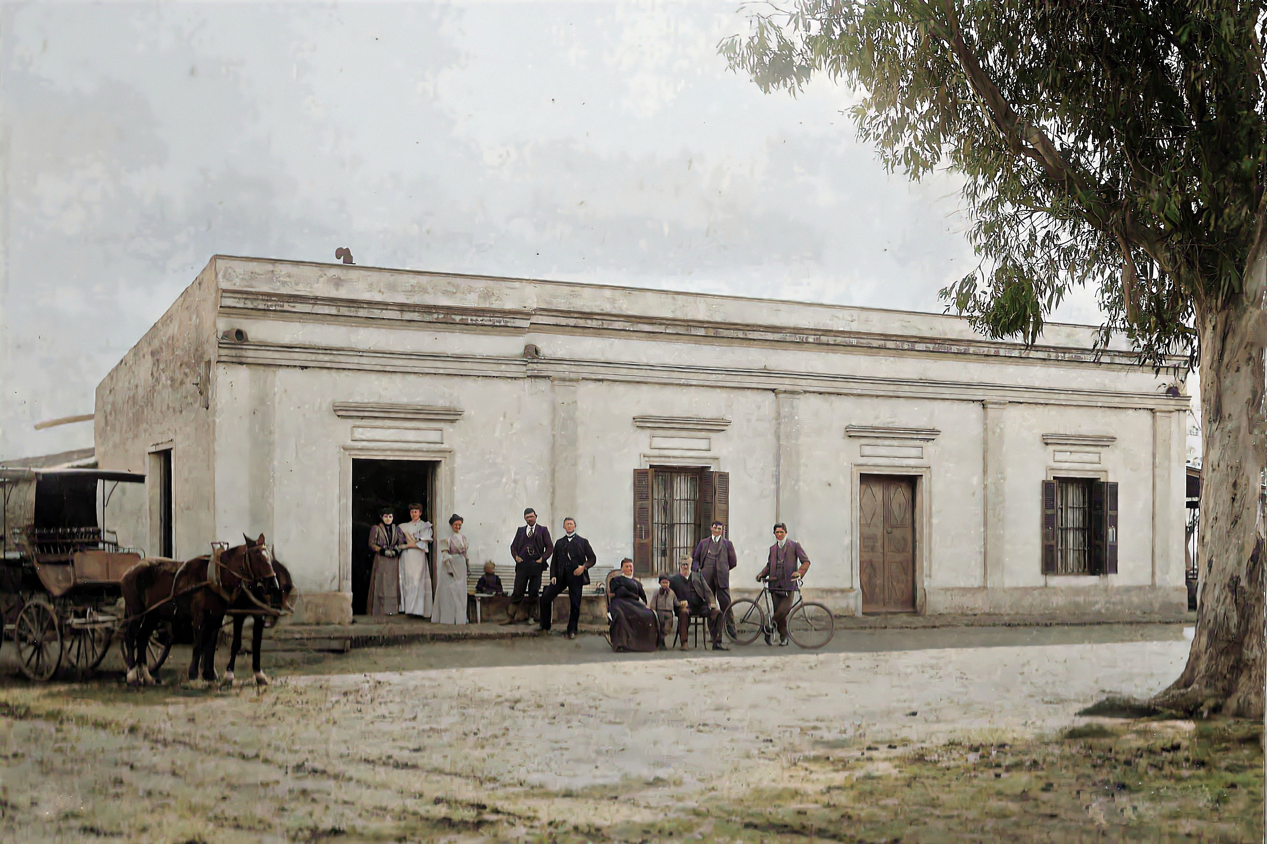 Descriptiva de la vida rural de los primeros colonos